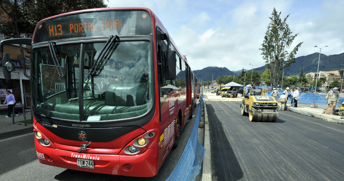 bus articulado manejando la ruta H13 en la avenida caracas